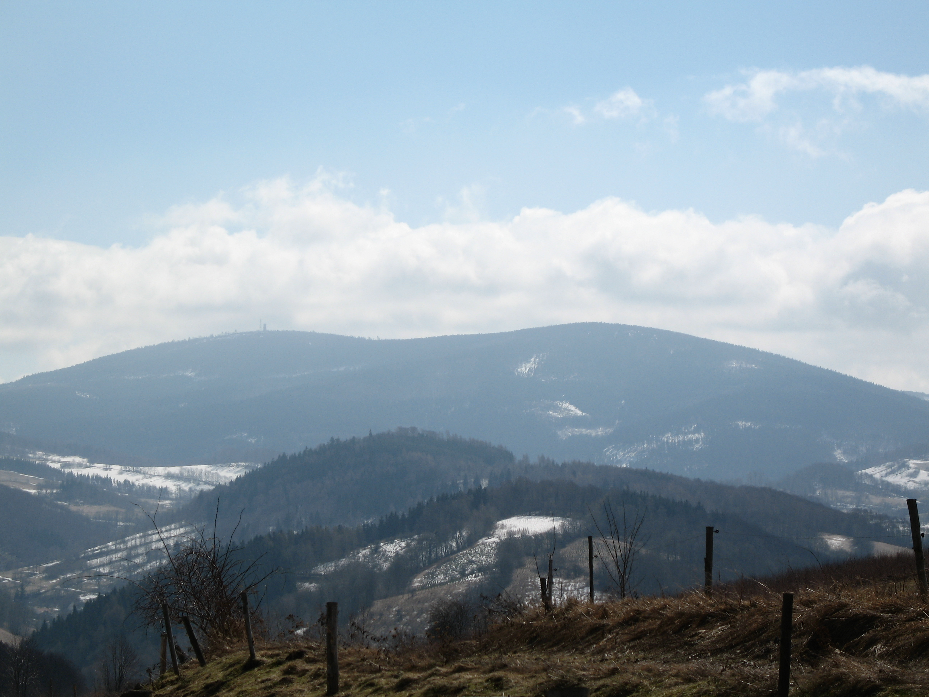 Widok z Niedźwiedzic na Wielką Sowę.